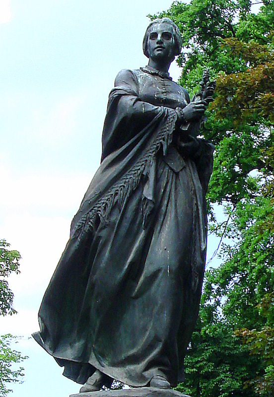 Pomník Boženy Němcové na Slovanském ostrově, Praha 1, Slovanský ostrov, Nové Město